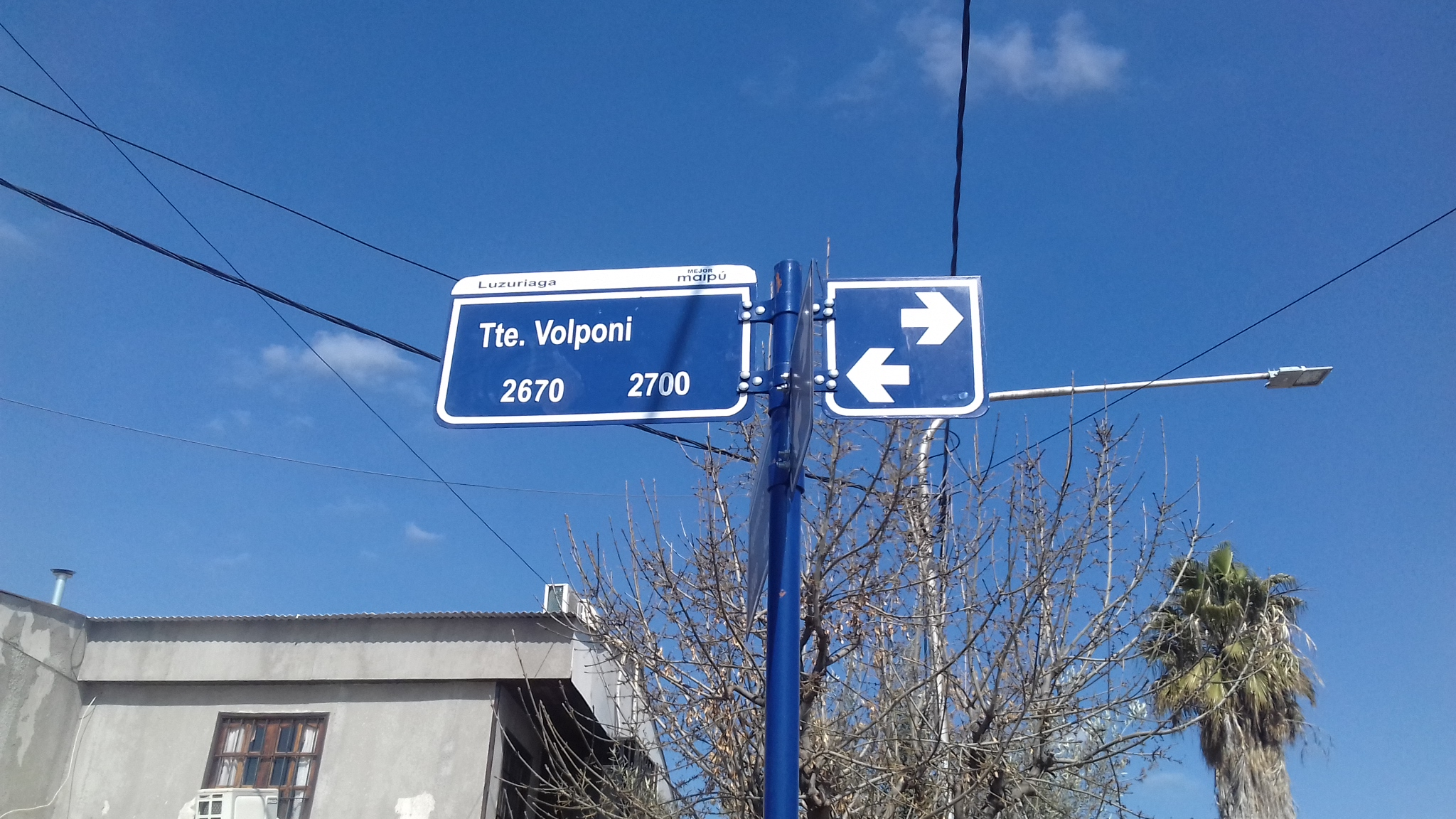 Placa de la calle Teniente Volponi, en el barrio Monseñor Maresma, del distrito Luzuriaga, departamento Maipú, provincia de Mendoza, República Argentina.